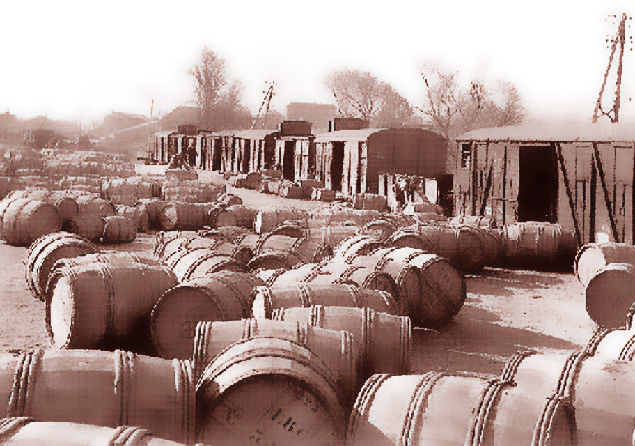 Chargement des barriques d'ocre sur les quais de la gare d'Apt au début du XXe s